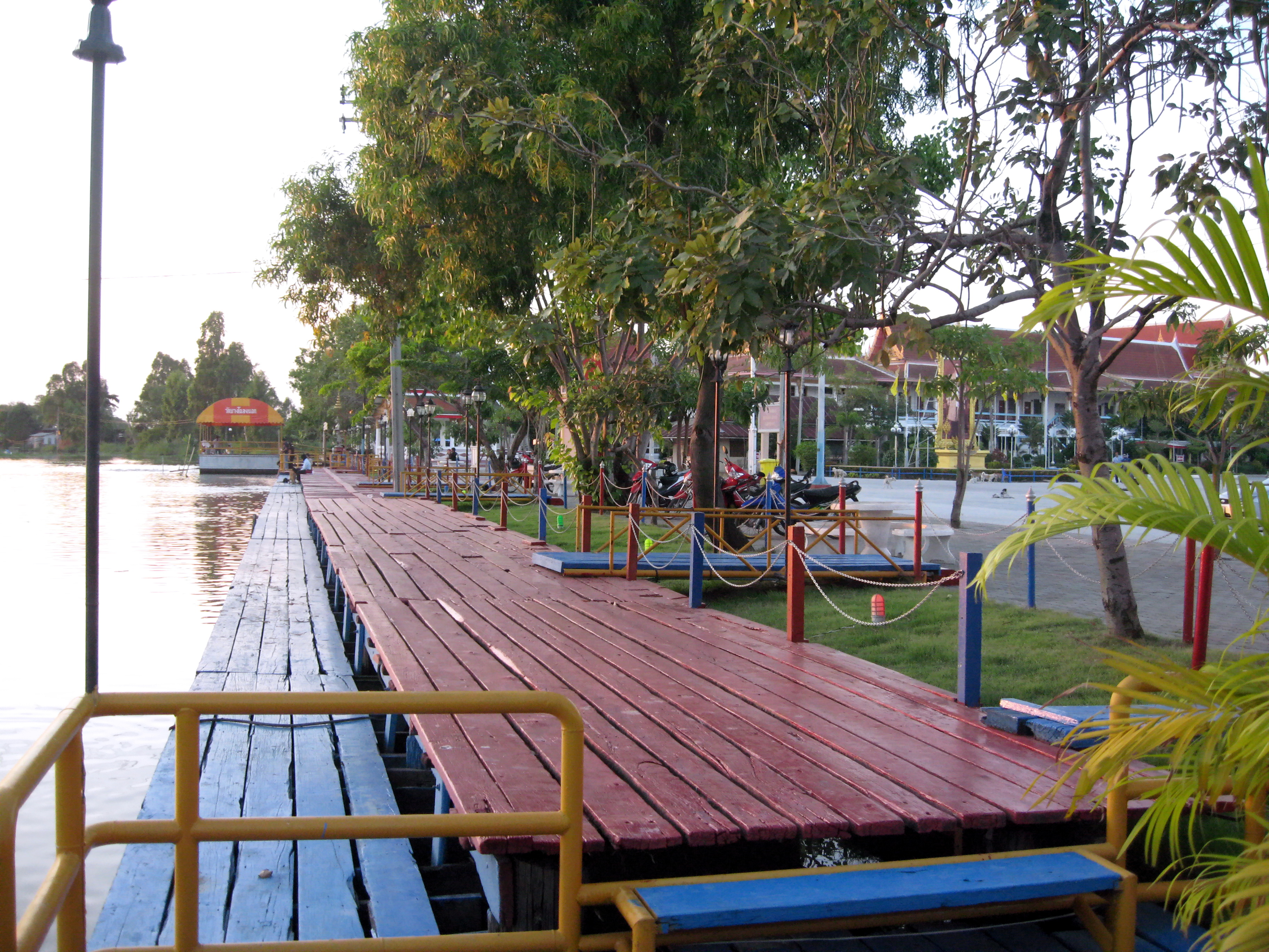 ท่าน้ำหน้าวัด